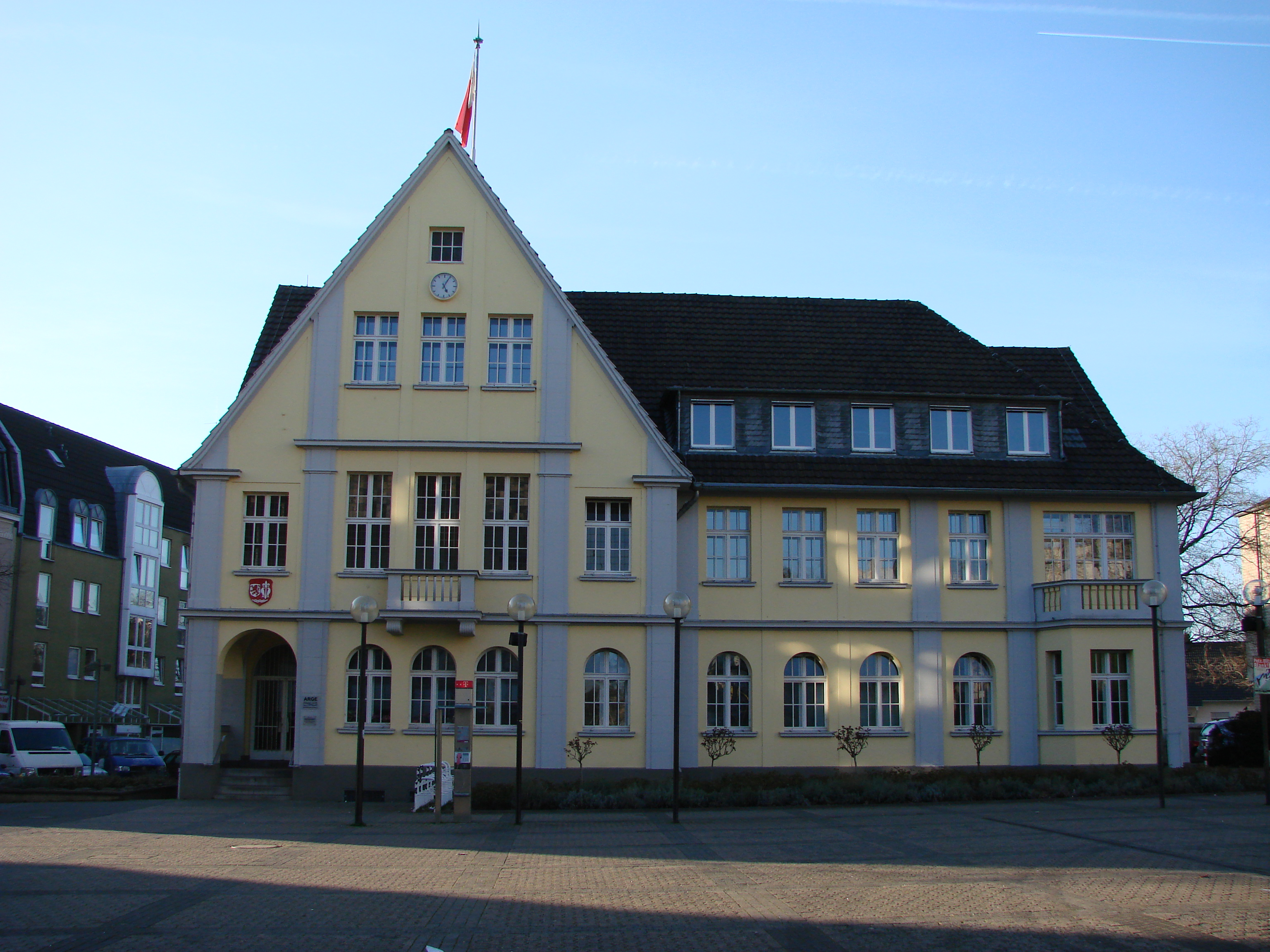 Altes Rathaus, Wesseling This is a photograph of an architectural monument.